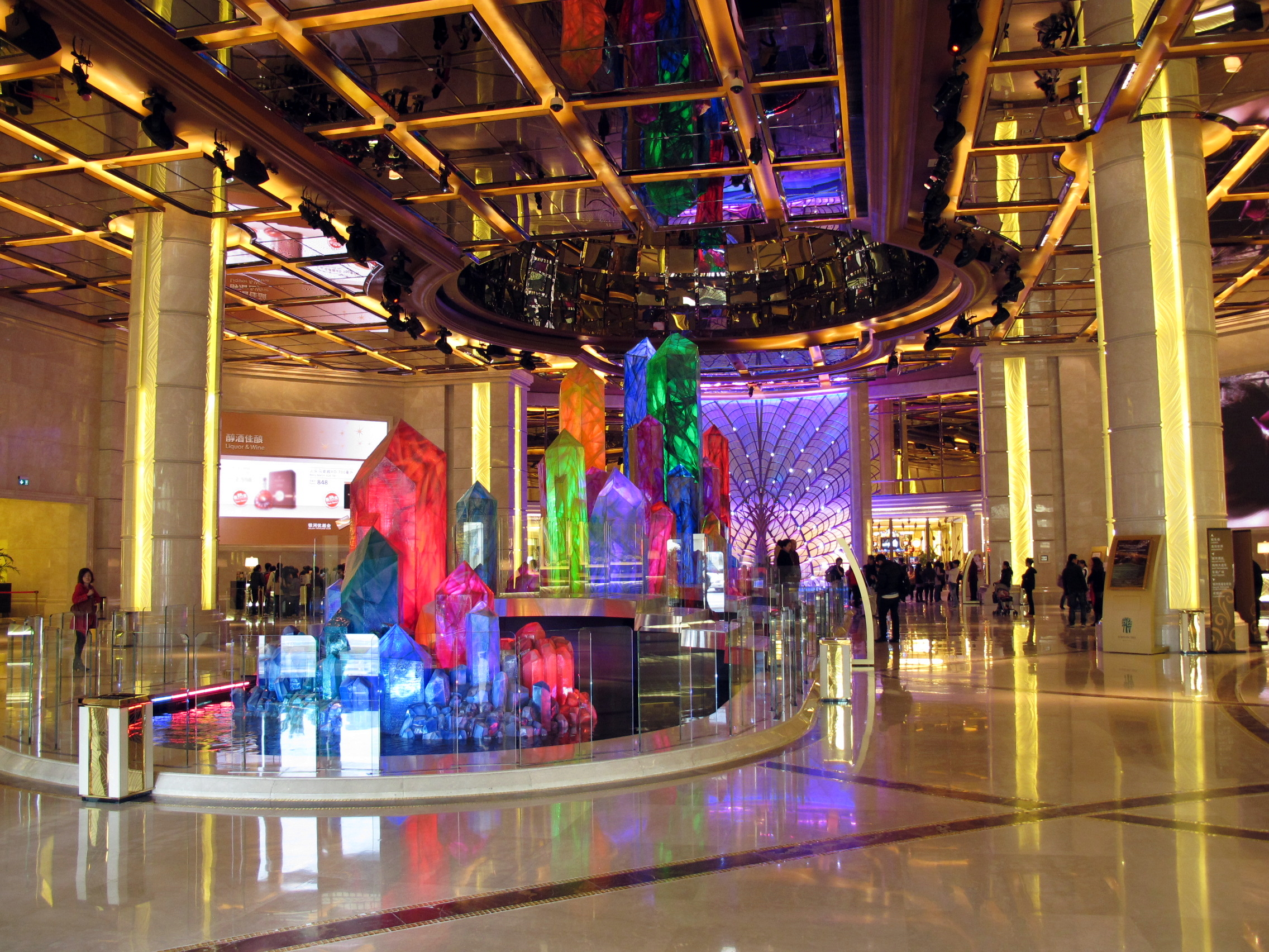 Galaxy Macau Crystal Lobby